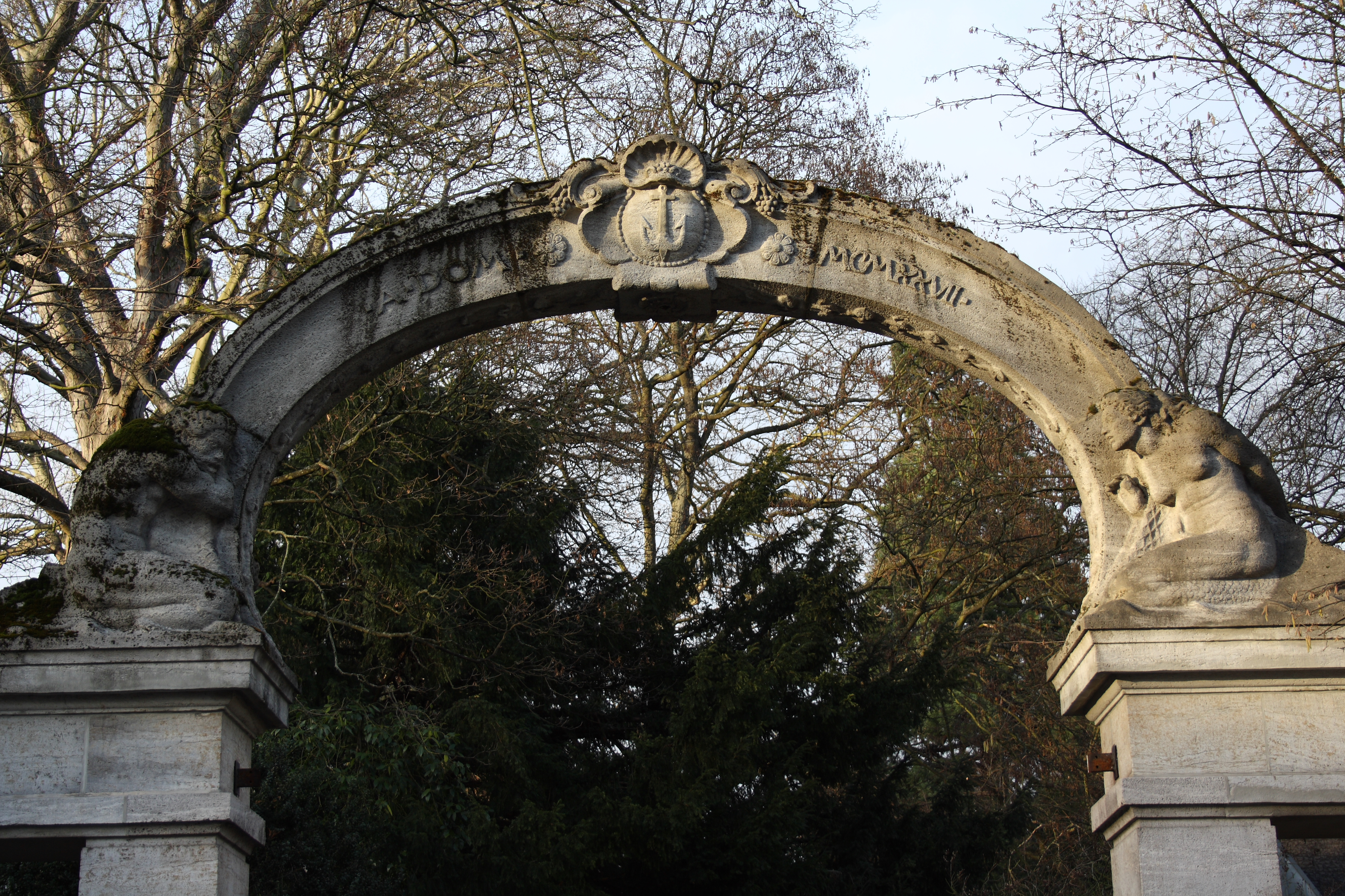 Eingang zum Fritz-Henkel-Park in Unkel, Bahnhofstraße 1, bezeichnet 1927